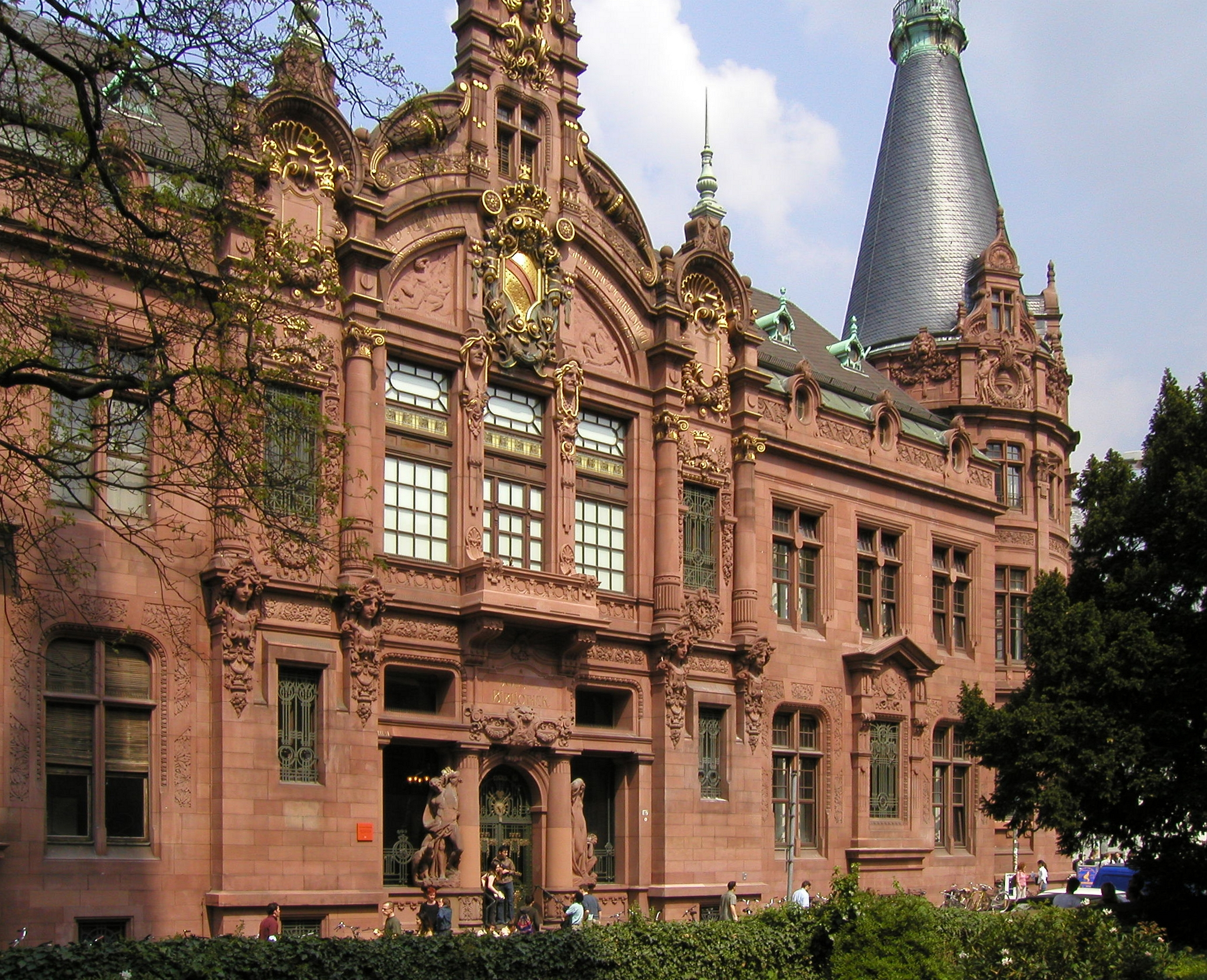 Universitätsbibliothek Heidelberg